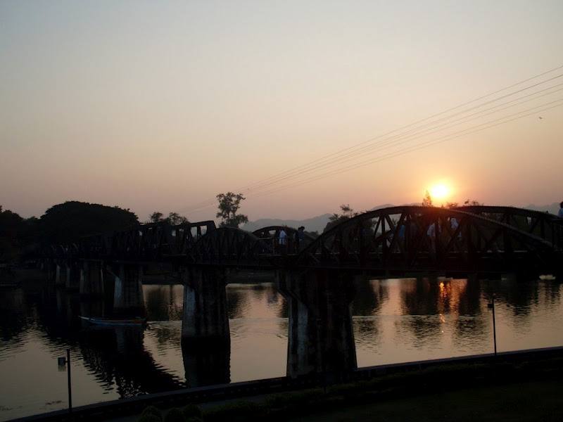 Kanchanaburi Kwai Koprusu.